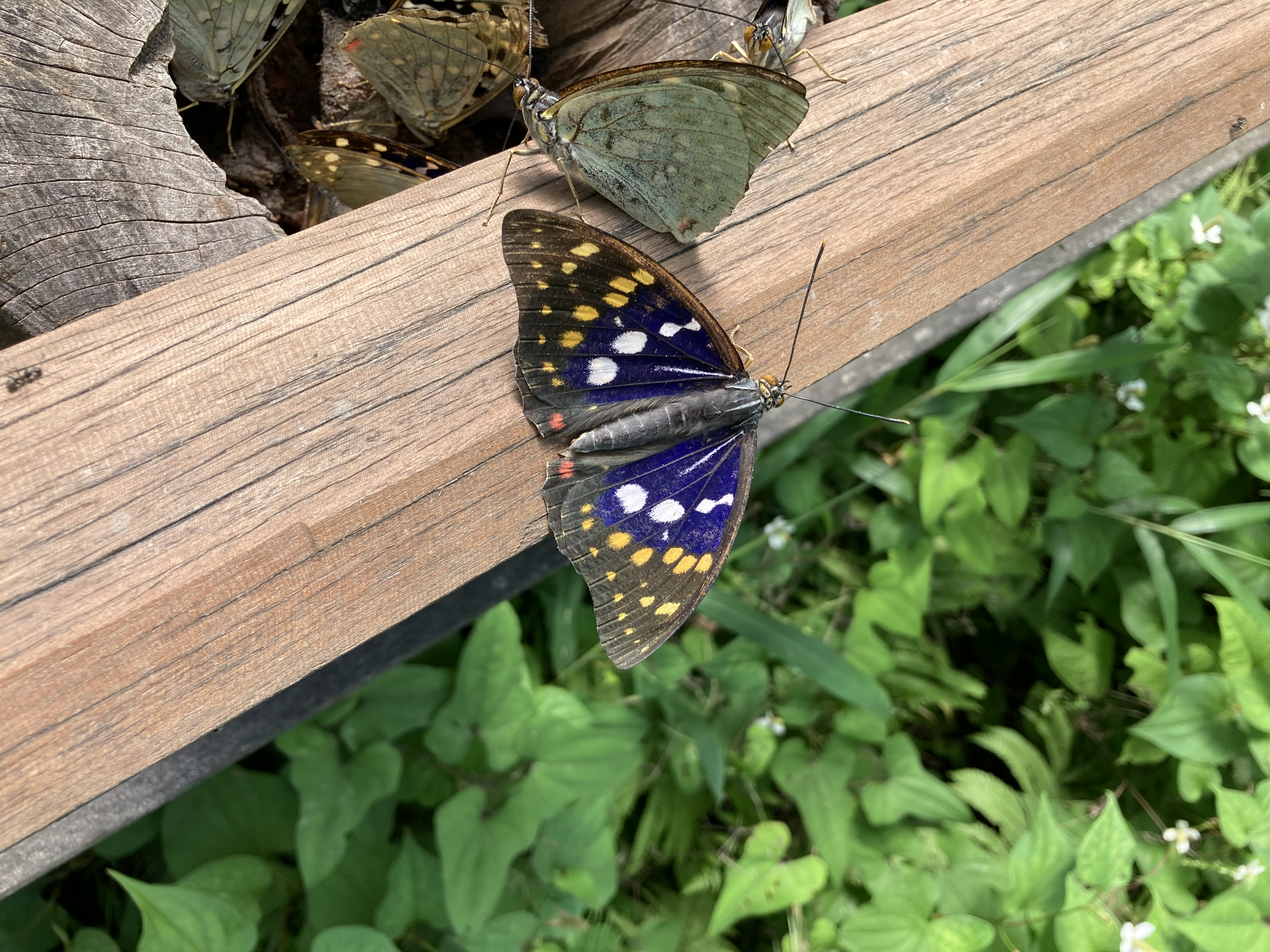 オオムラサキ♂